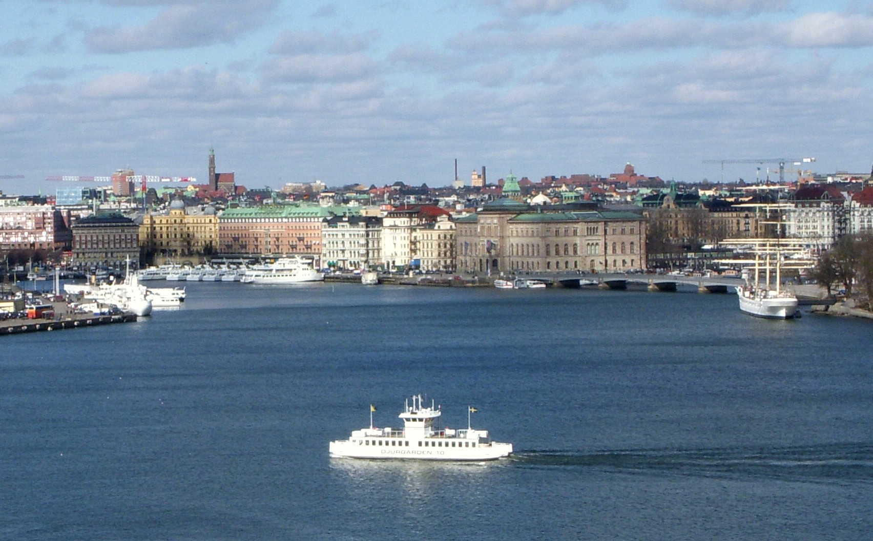 Blasieholmen från Mosebacke i Stockholm